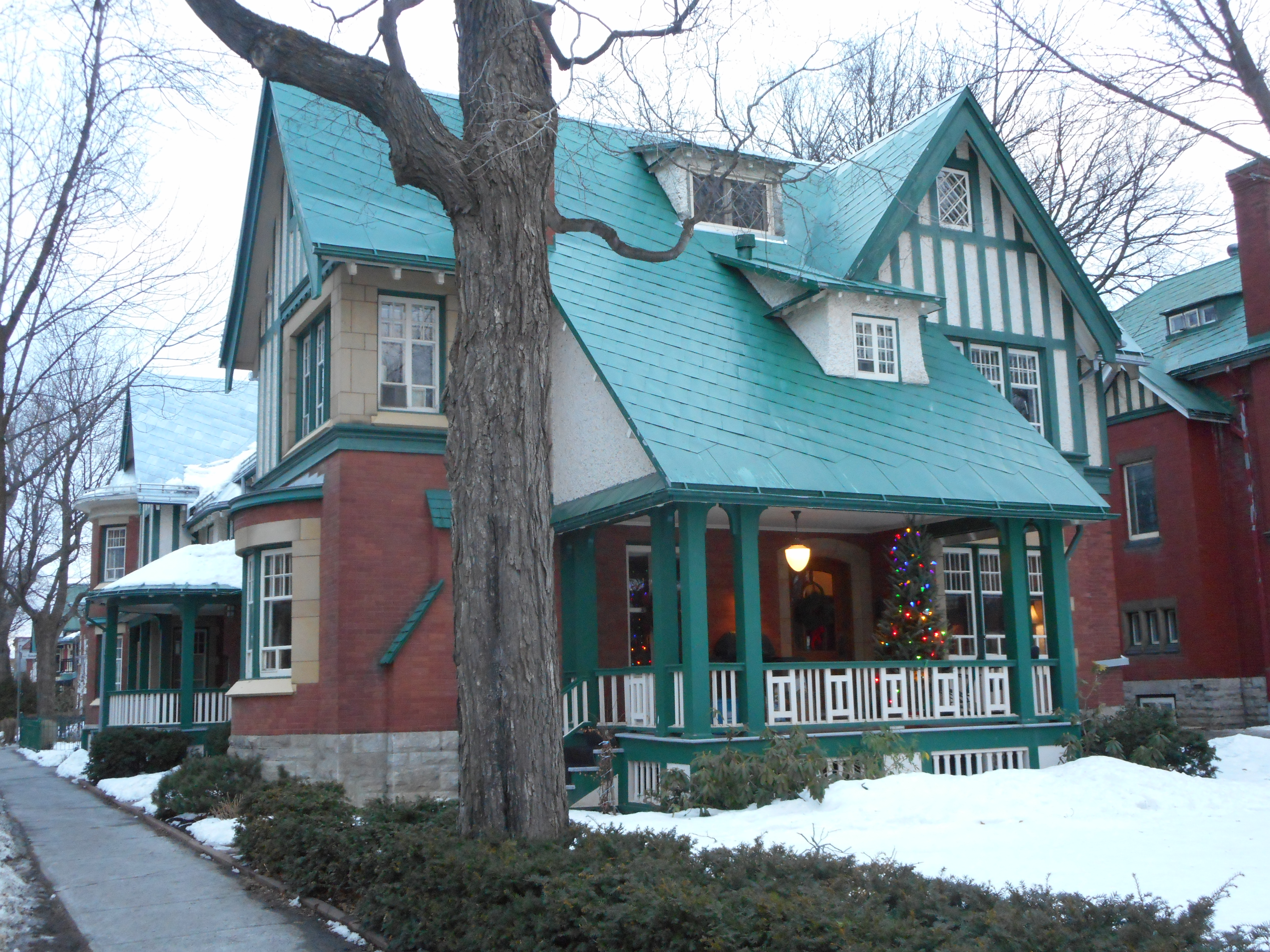 Résidence Ross, 1185, avenue du Parc, Québec « C'est en mai 1916 que débute la construction des maisons mitoyennes qui forment le coin du chemin Saint-Louis et de l'avenue du Parc. Ernest Ross, propriétaire de la manufacture Parisian Corset, fait ériger cet ensemble pour lui et ses deux fils. Comme plusieurs des maisons de cette avenue et du quartier, elles sont l'oeuvre des architectes Harry et Edward B. Staveley. »